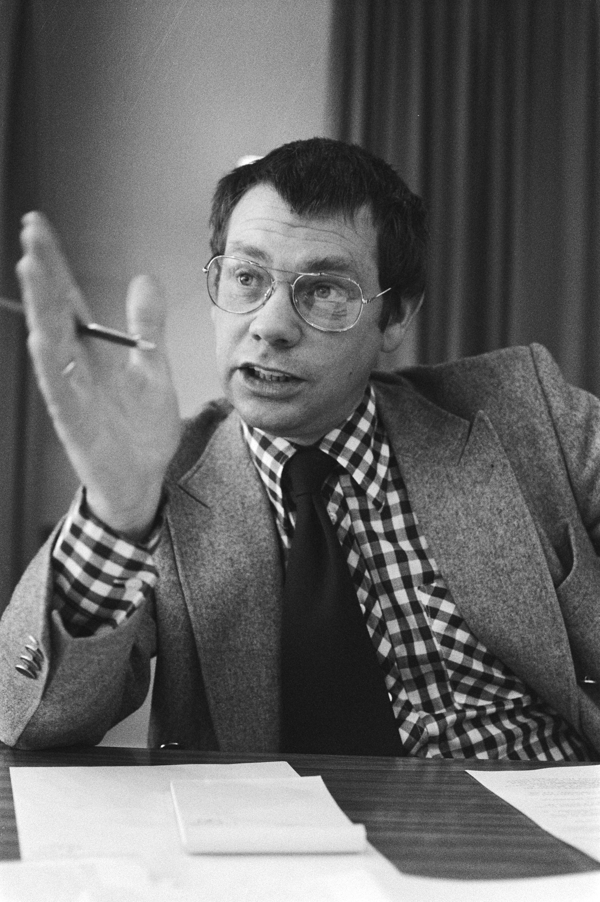 Collectie / Archief : Fotocollectie Anefo Reportage / Serie : [ onbekend ] Beschrijving : ARP partijraad Hoogeveen; Kamerlid Faber Datum : 20 mei 1978 Locatie : Hoogeveen Trefwoorden : kamerleden, partijraden Persoonsnaam : Faber Instellingsnaam : ARP Fotograaf : Verhoeff, Bert / Anefo Auteursrechthebbende : Nationaal Archief Materiaalsoort : Negatief (zwart/wit) Nummer archiefinventaris : bekijk toegang 2.24.01.05 Bestanddeelnummer : 929-7296